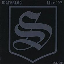 Logo von Skrewdriver, Album Live at Waterloo